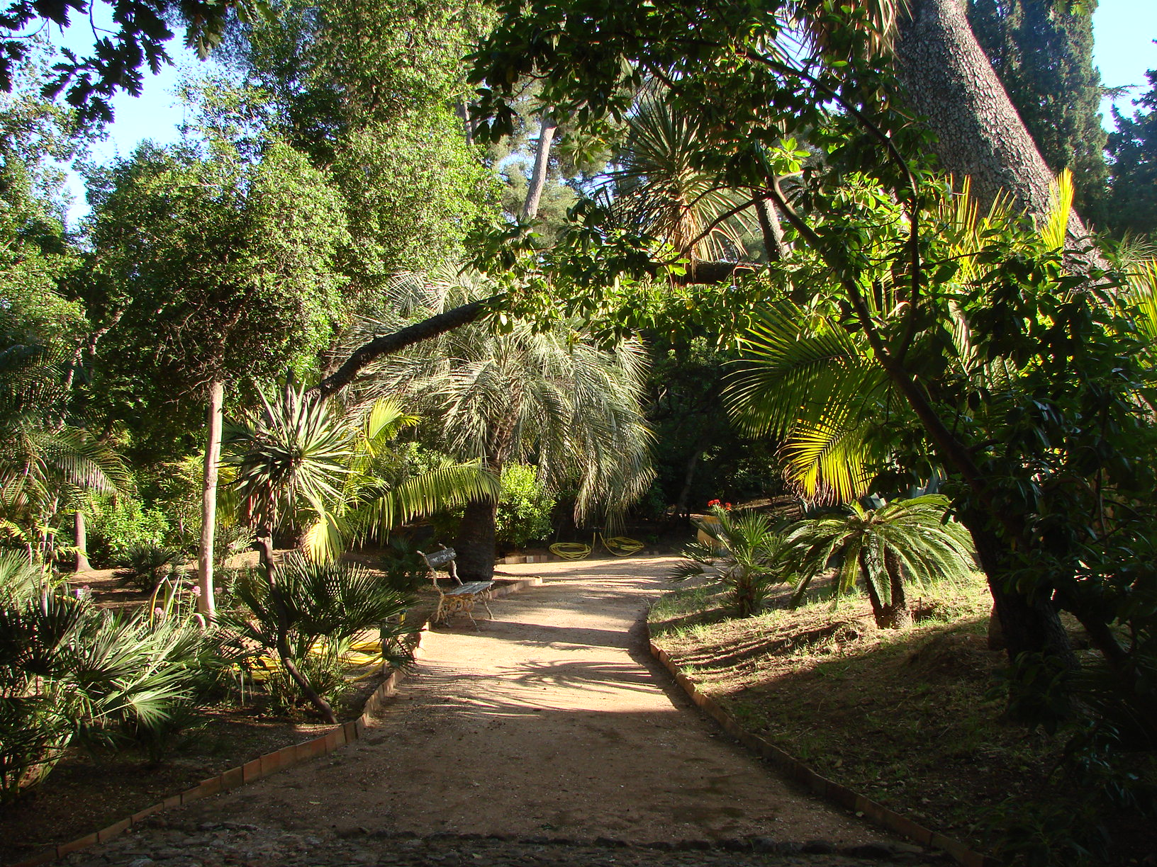 Le Plantier